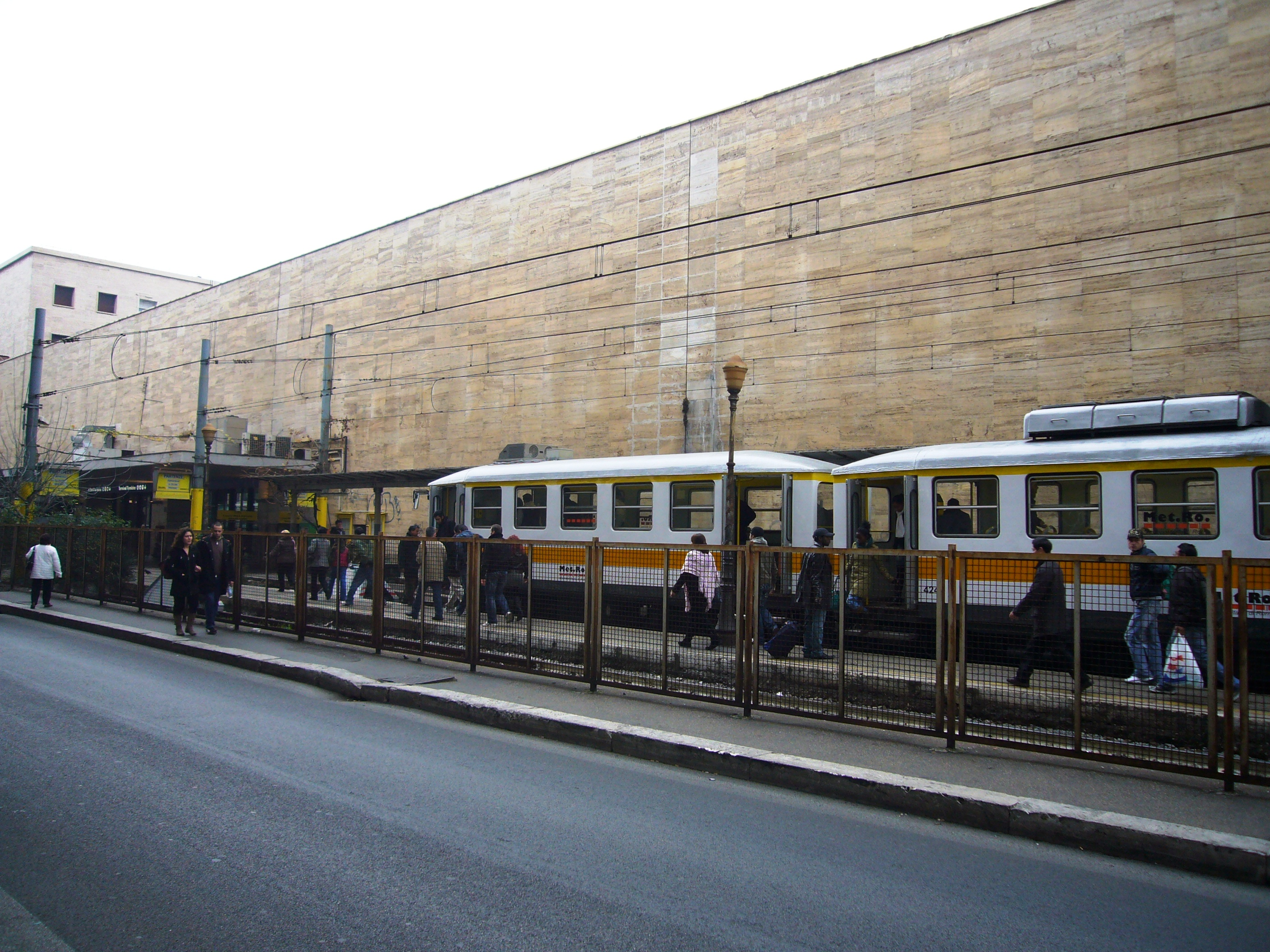 Roma, capolinea della ferrovia Roma-Pantano alla Stazione di Roma Laziali.